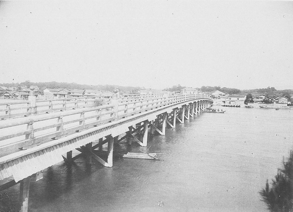 瀬田の唐橋 滋賀県大津市 1902年頃